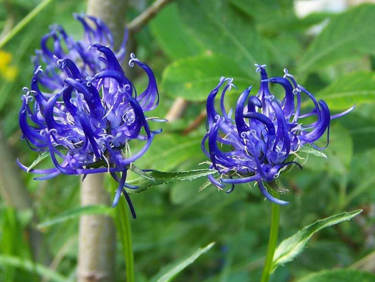 Phyteuma orbiculare (pl. zerwa kulista), habitat: Tatra Mountains, Królowa Rówień